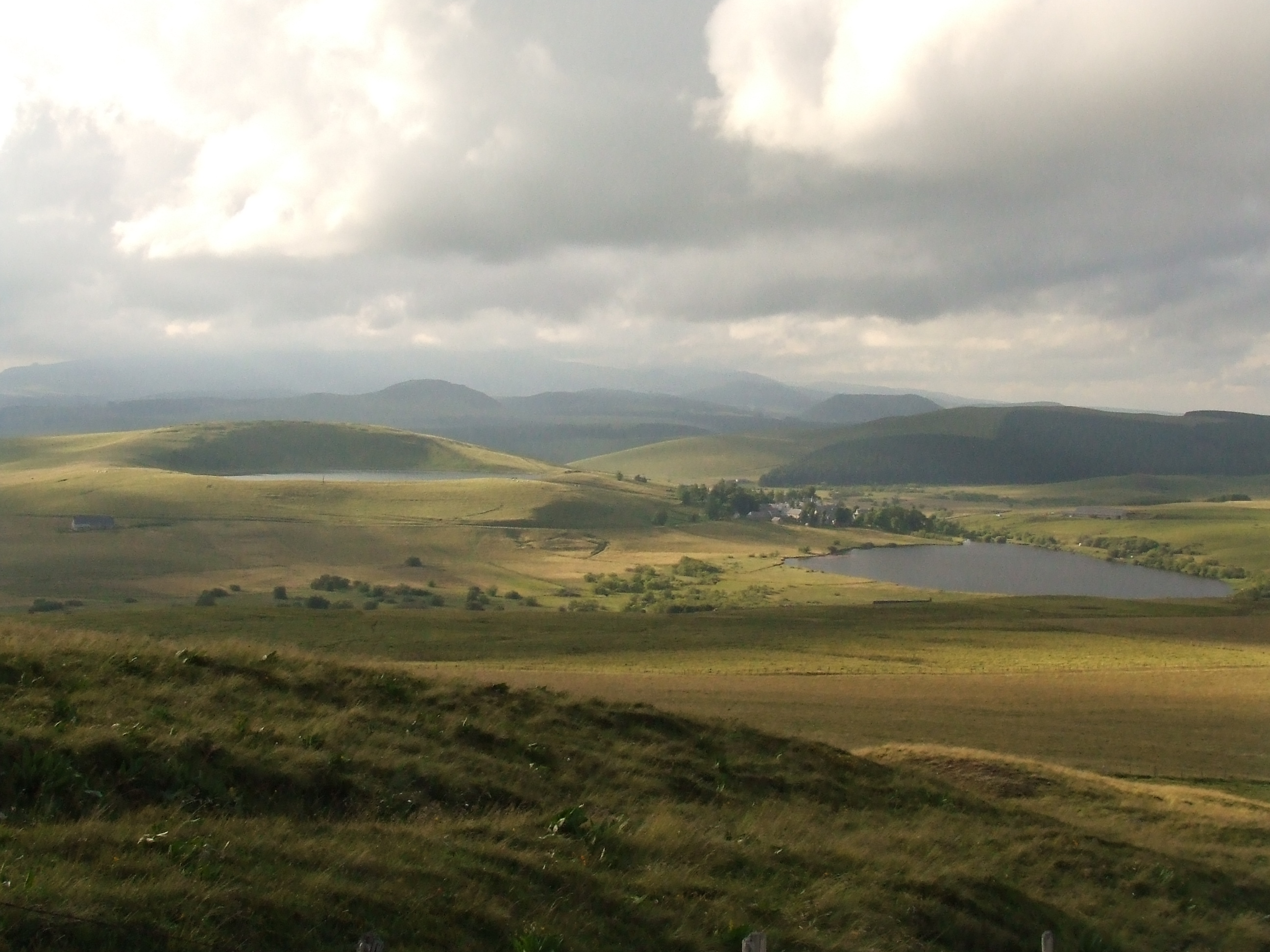 La Godivelle et ses deux lacs, département du Puy-de-Dôme, Auvergne. A gauche, le Lac-d'en-Haut, d'origine volcanique, à droite le Lac-d'en-Bas, d'origine glaciaire, bordé par la tourbière, classée depuis 1975 en réserve naturelle nationale.